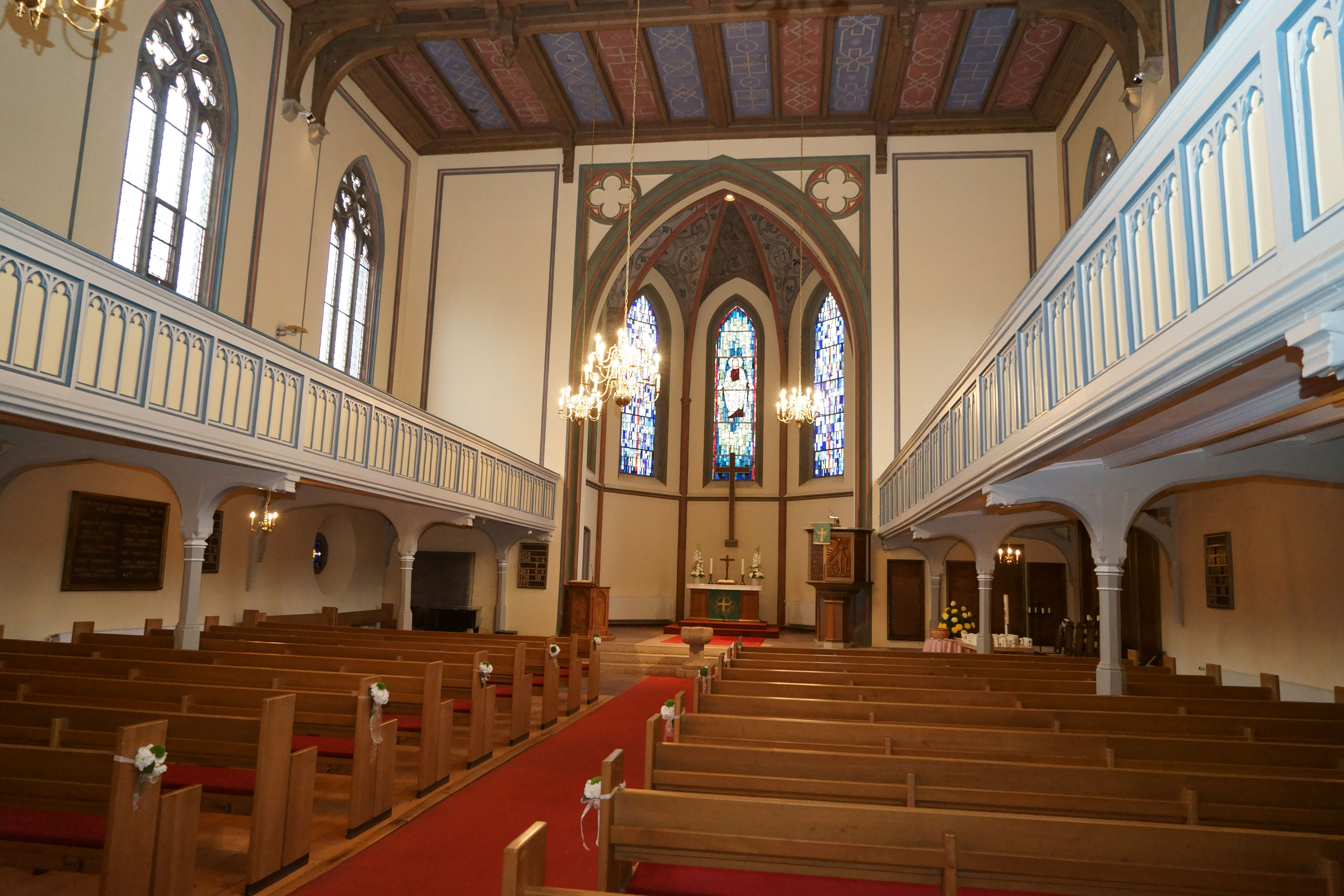 St. Johann in Bremen, Oberneulander Landstraße 41. Blick Richtung Chor mit EmporenDas abgebildete Objekt ist ein geschütztes Kulturdenkmal in der Freien Hansestadt Bremen, mit der Nr. 1234 beim Landesamt für Denkmalpflege registriert.